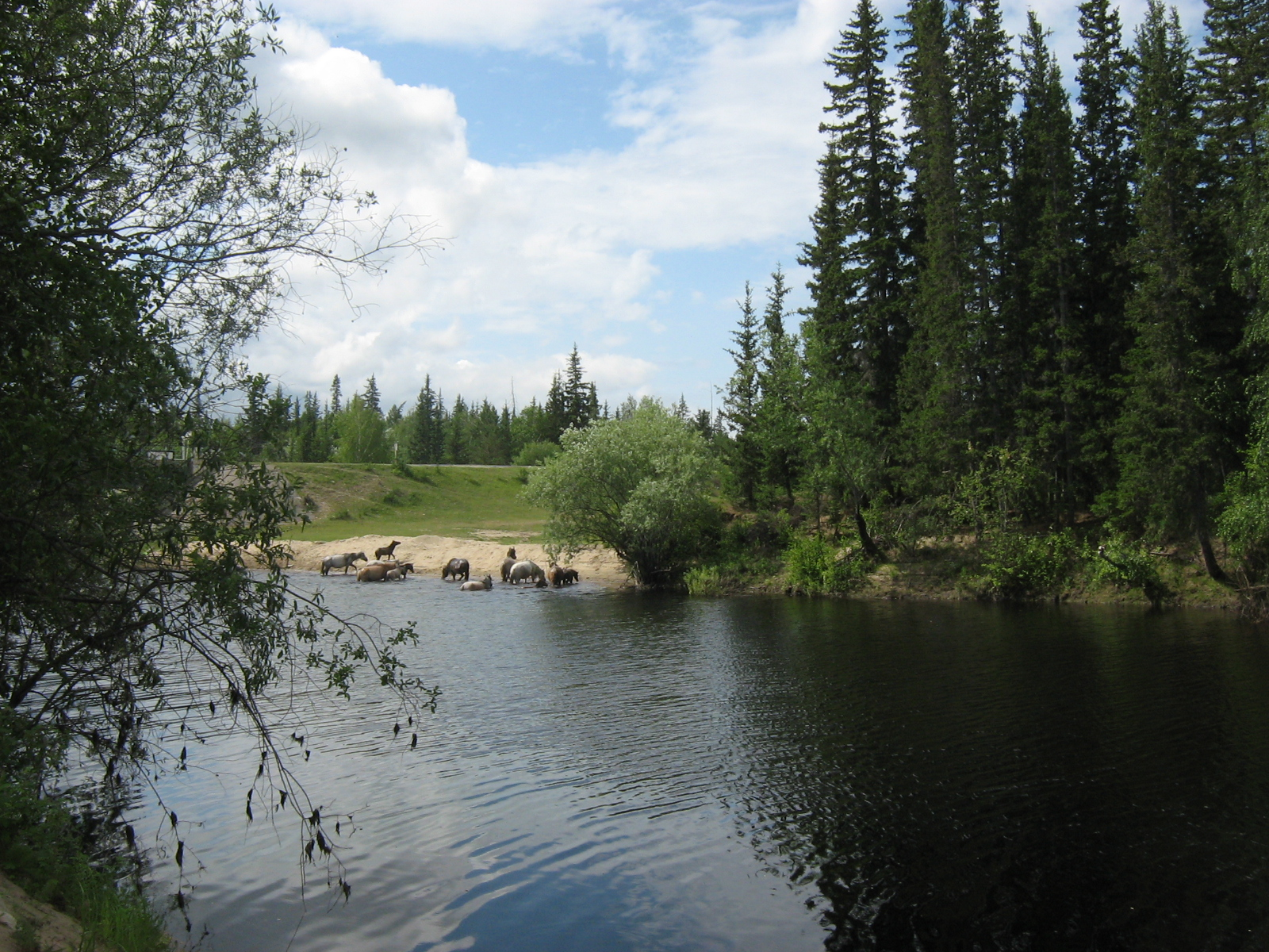 Хангаласский улус, Якутия